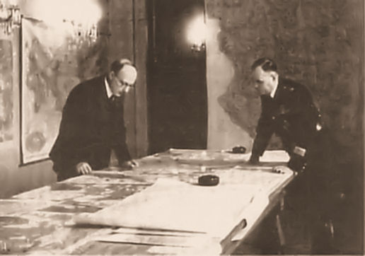 Presidentti Ryti ja 1. adjutantti Söderström tutkailevat tilannekarttaa jatkosodan puhjettua Linnan goottilaisessa salissa.